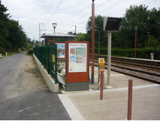 Vue des quais de la gare de Saint Médard dur Ille (35).